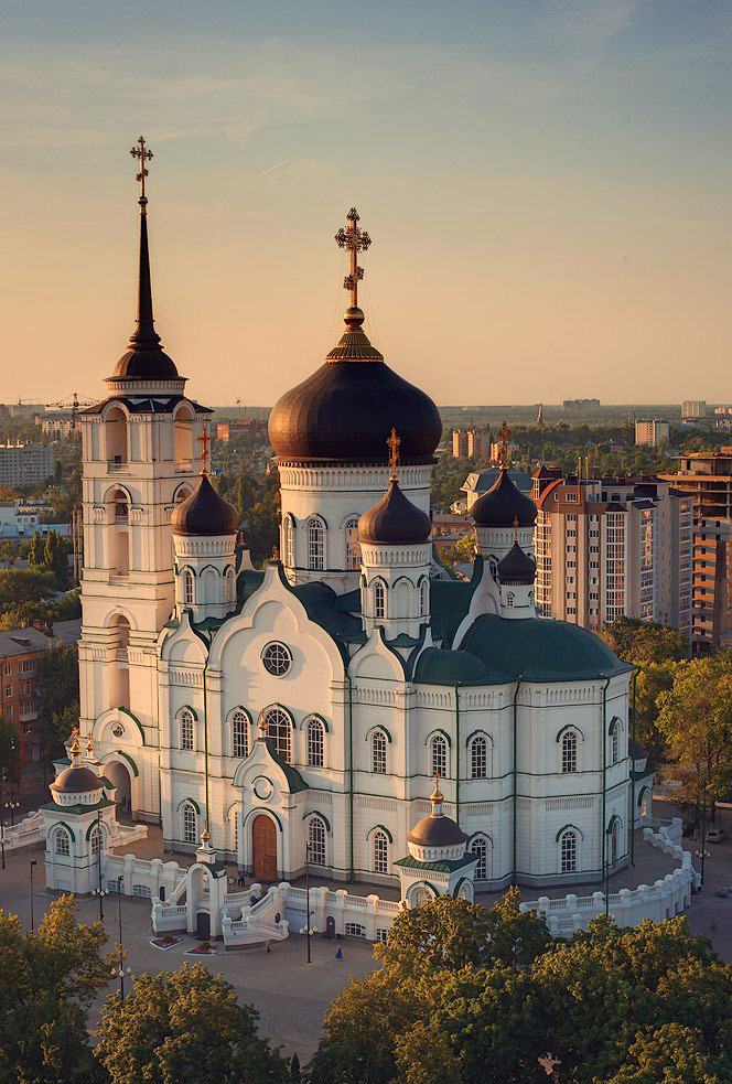 Кафедральный собор Благовещения Пресвятой Богородицы